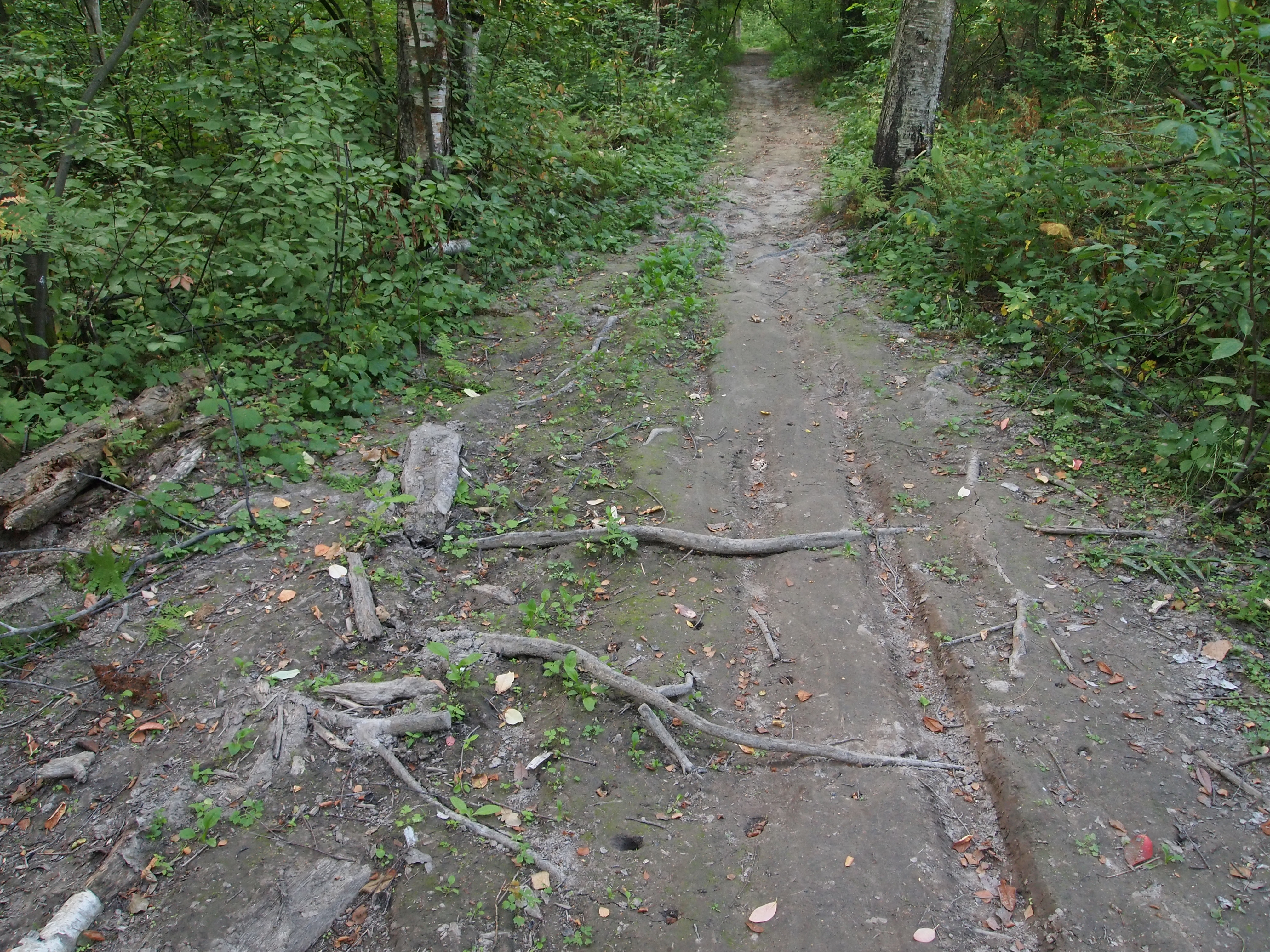 Ульяновский лесопарк - повреждённые корни